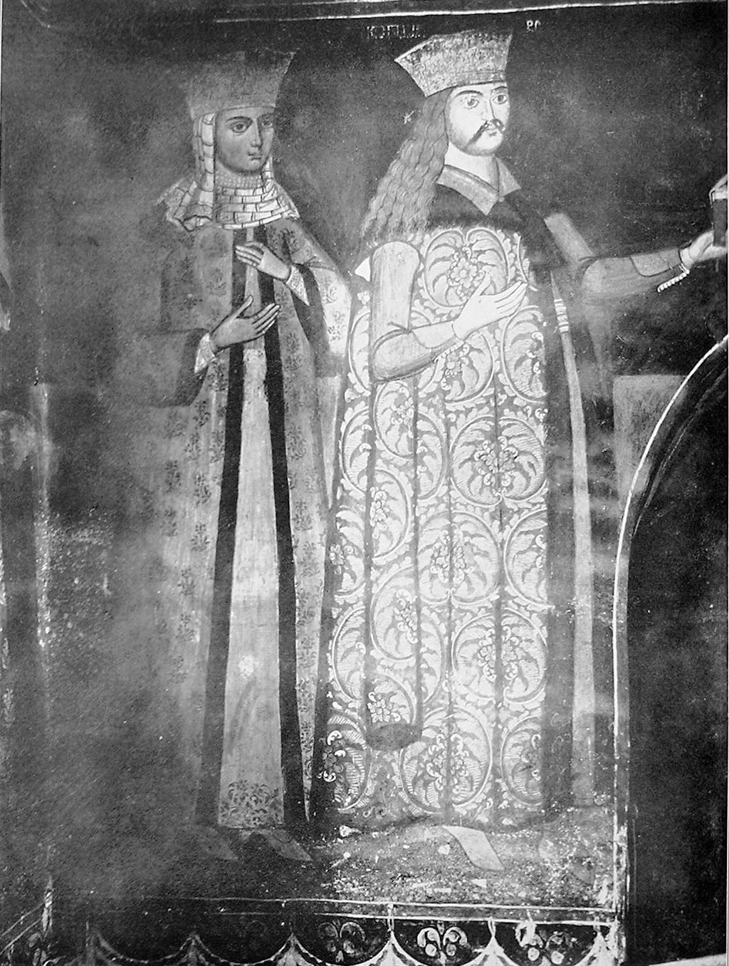 Radu cel Mare and his consort, lady Cătălina, at Govora monastery